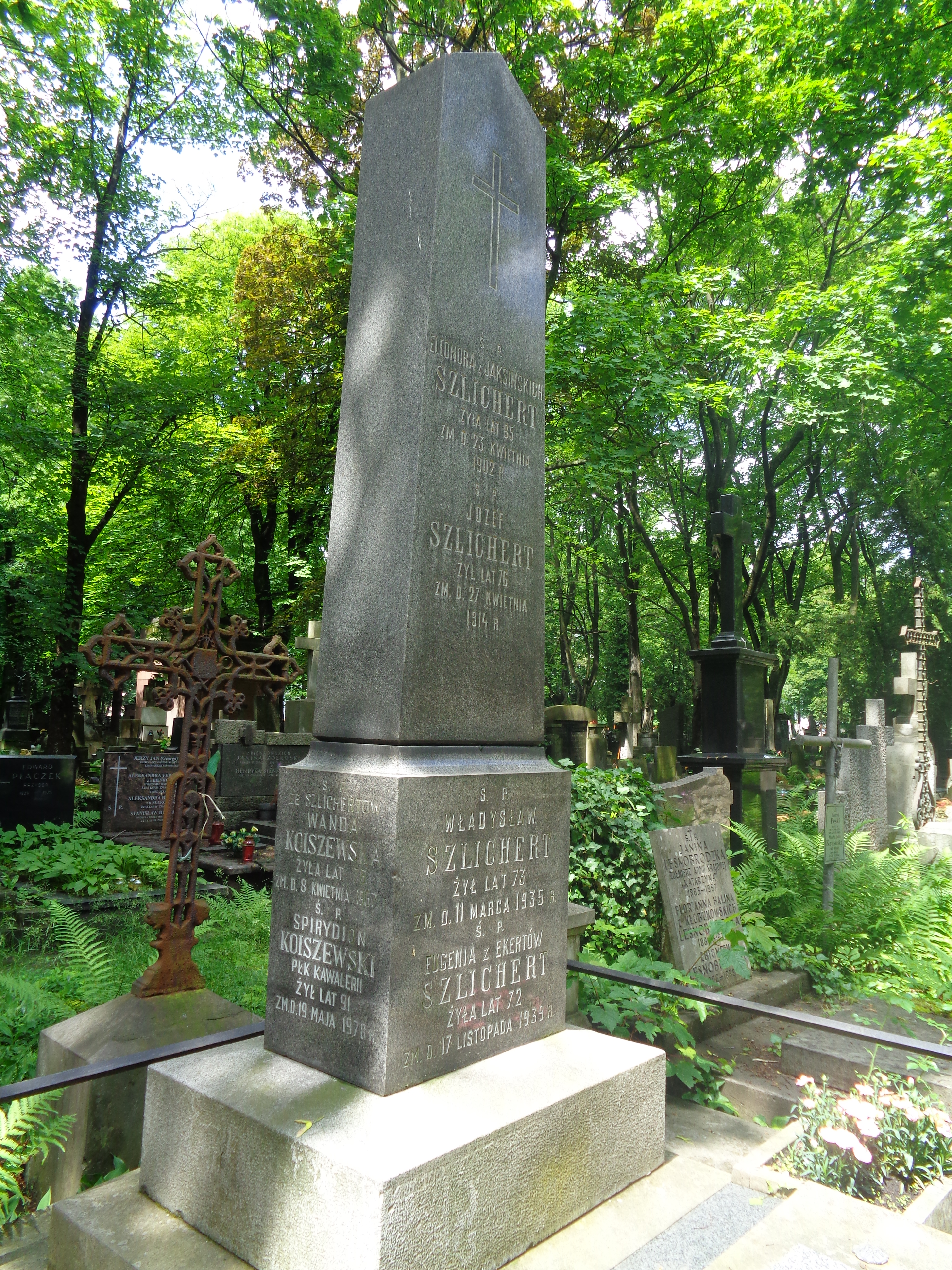 Grób Spirydiona Koiszewskiego na Cmentarzu Powązkowskim